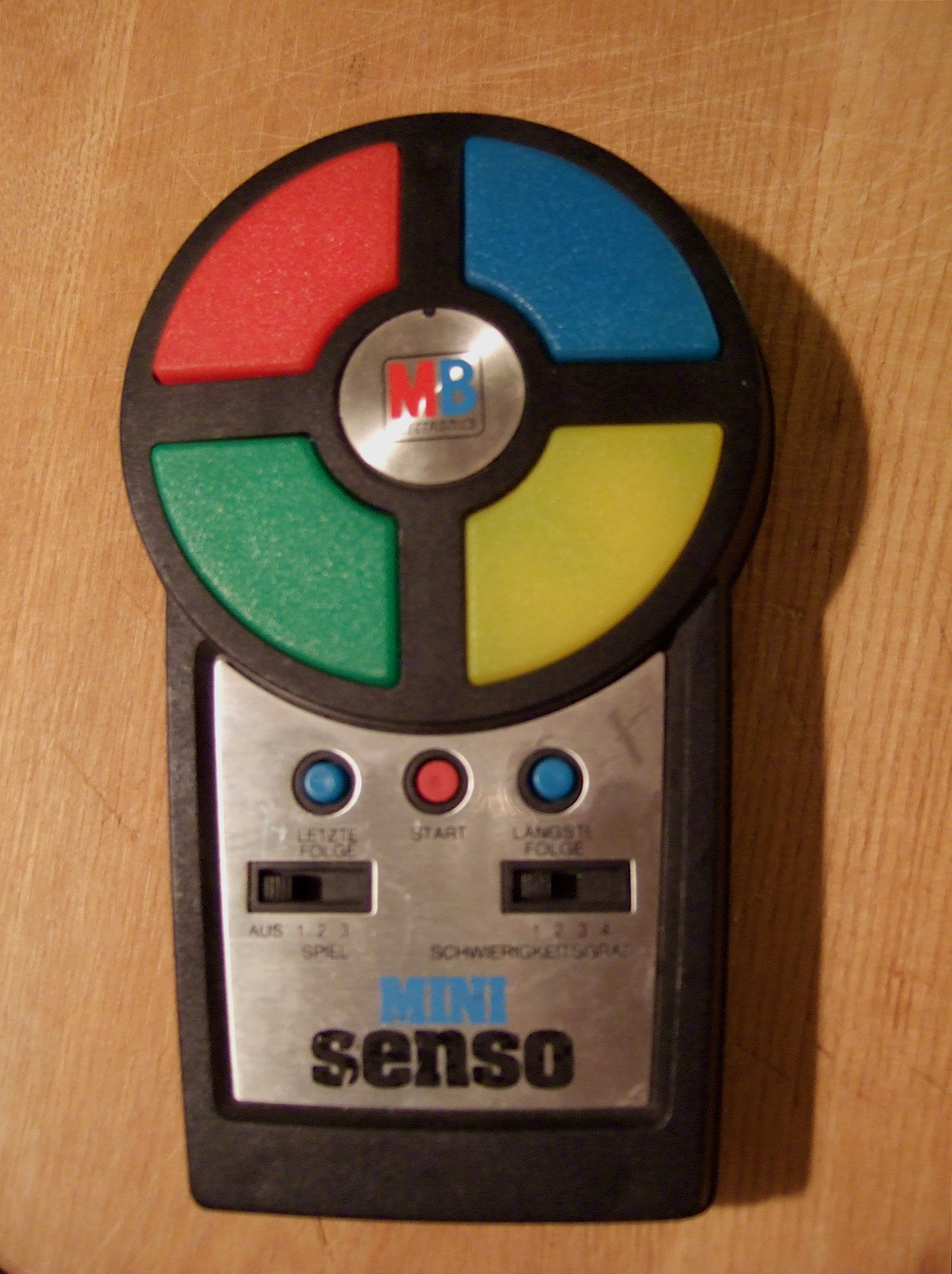 MiniSenso von MB